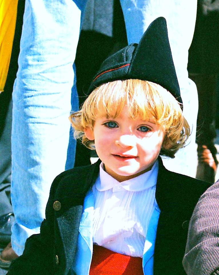 enfant avec montera picona